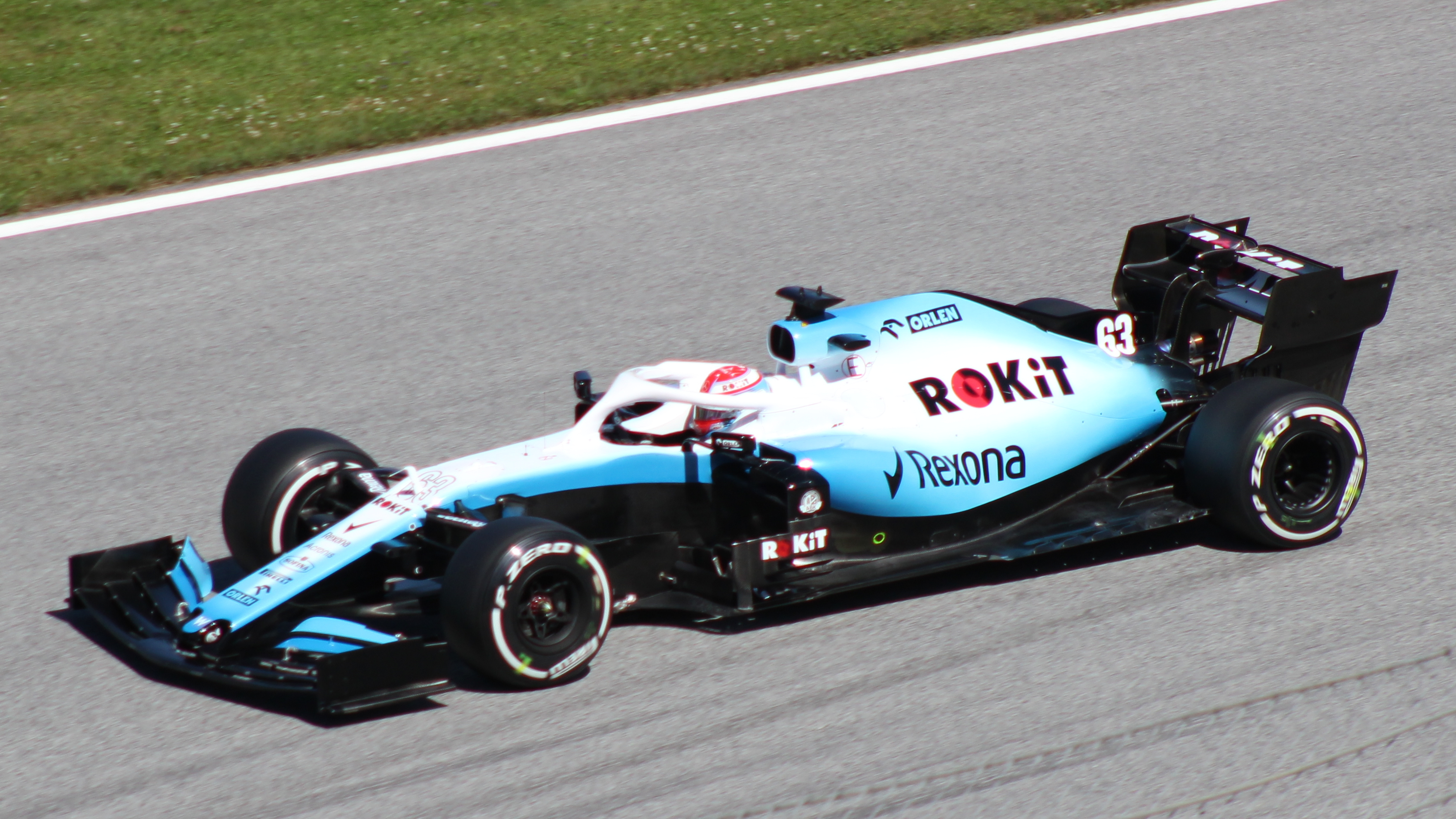 Russell beim Rennwochenende in Österreich 2019